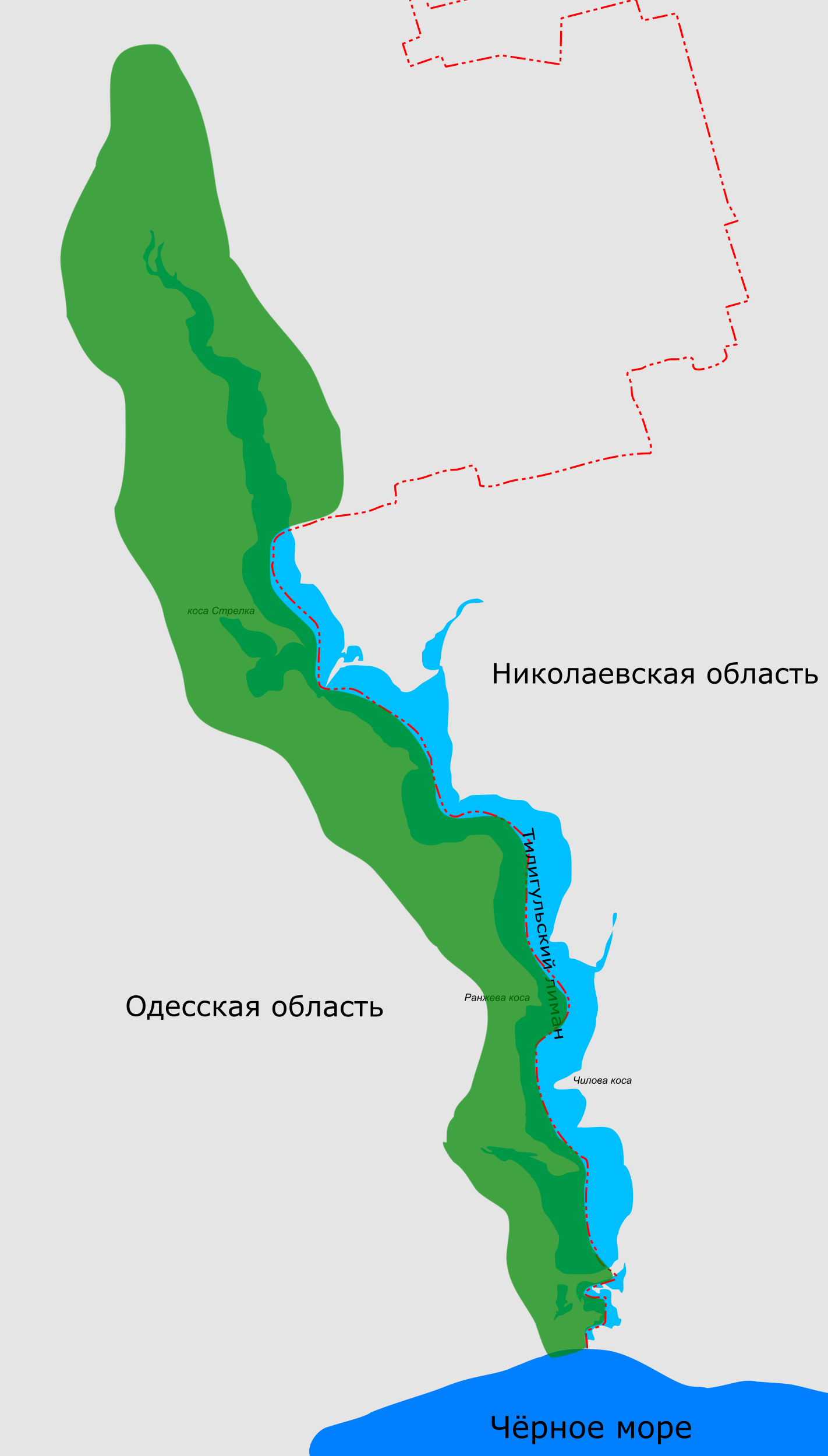 Tiligul park in Odesskaya oblast